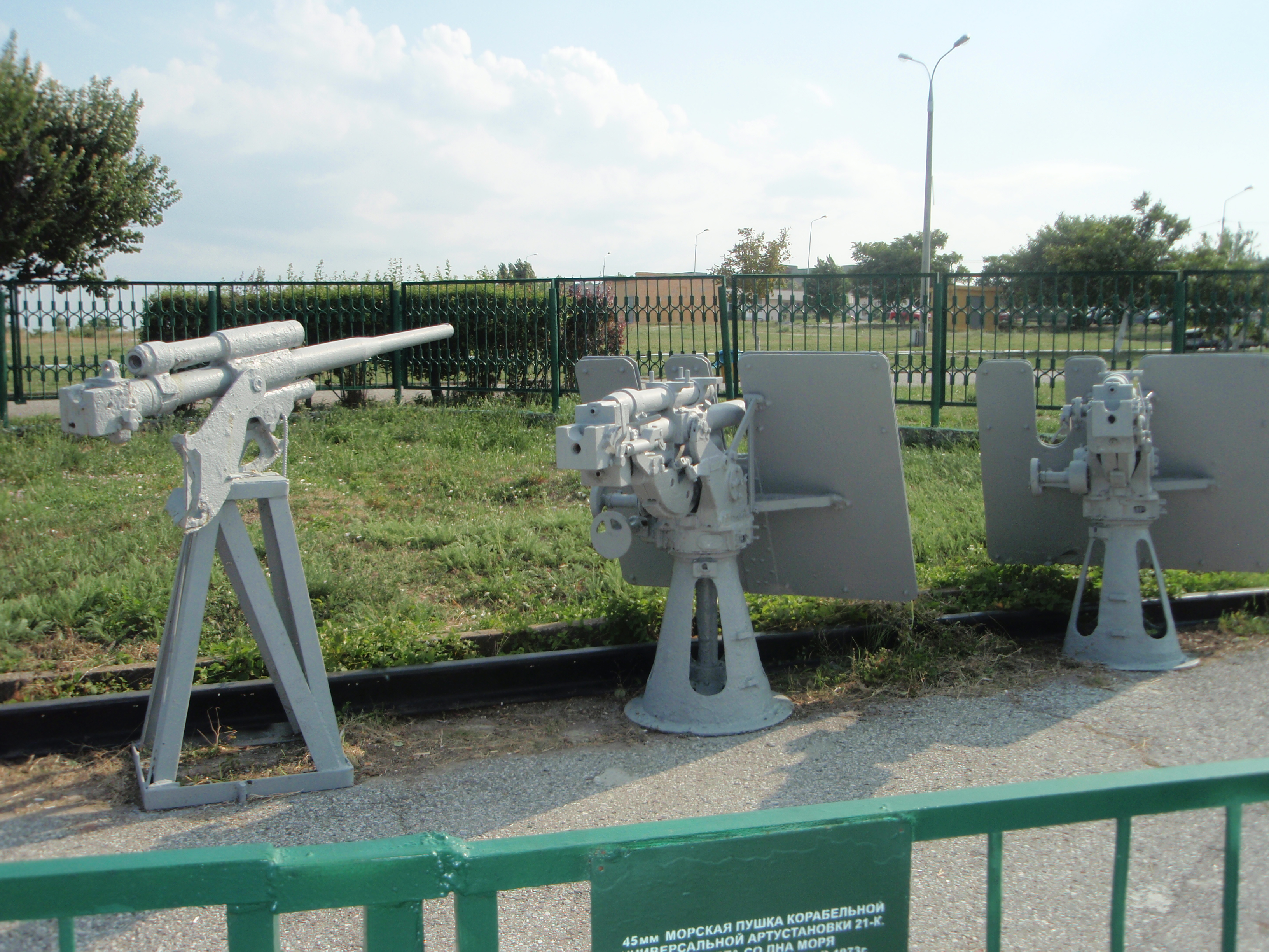 Советская 45-мм корабельная пушка 21-К в музее-заповеднике «Малая земля» (г.Новороссийск)